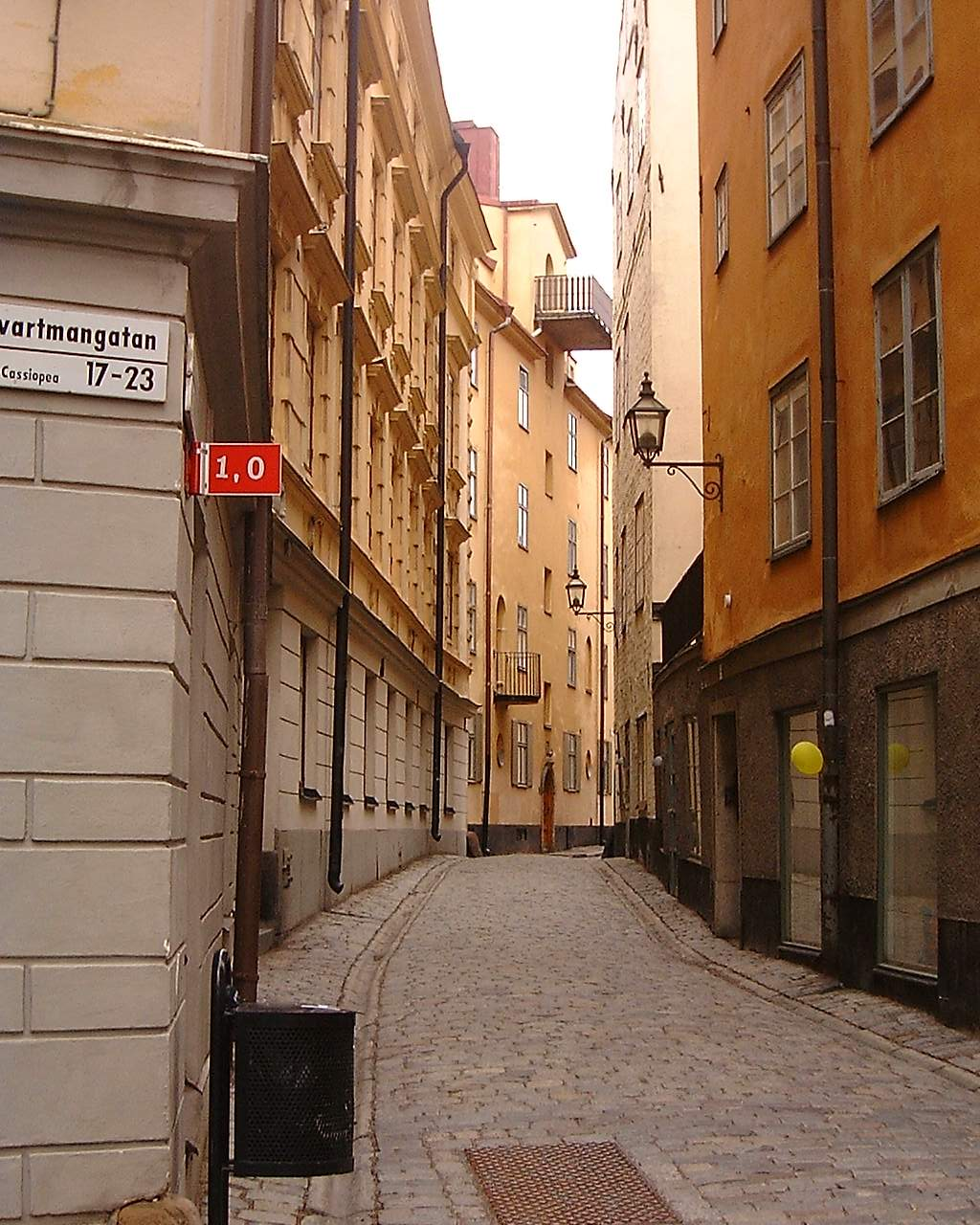 Tyska Skolgränd